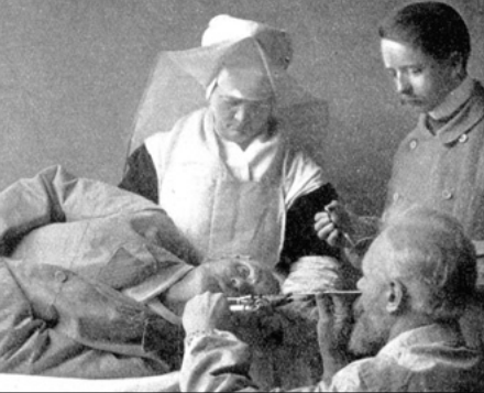 Durchführung einer Ösophagoskopie in Seitenlage nach Mikulicz von Gustav Killian